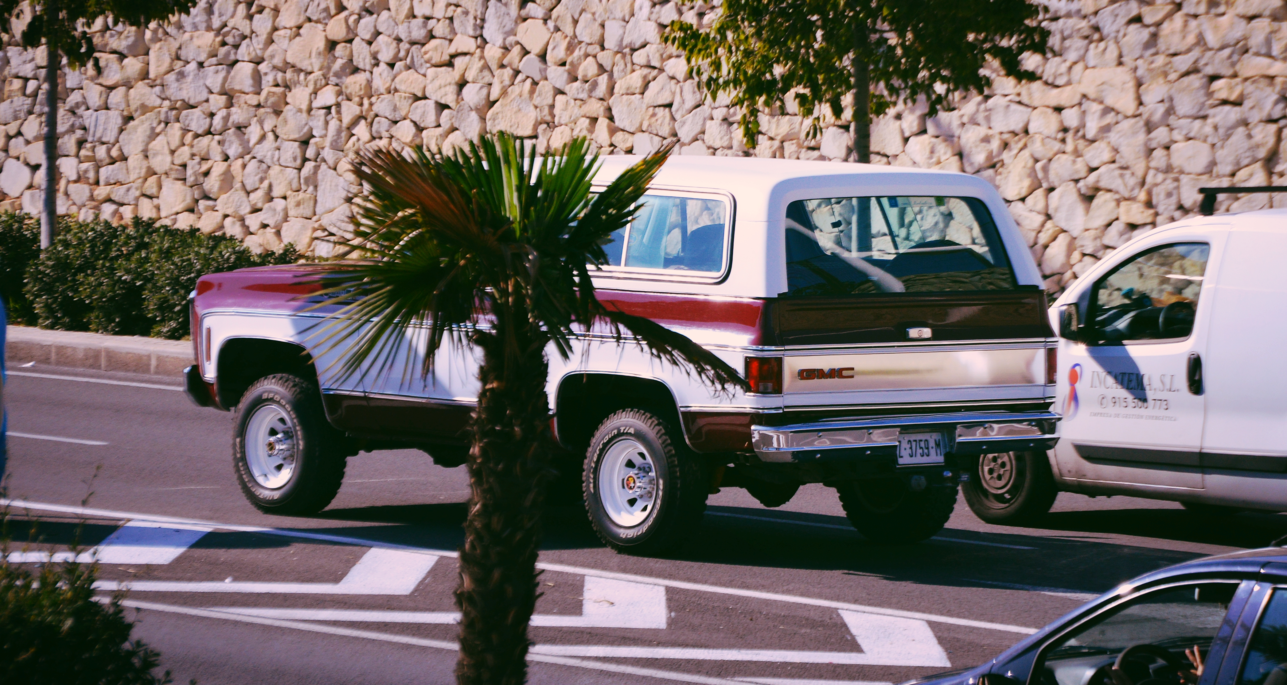 1980 GMC Jimmy.